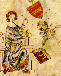 Eike von Repgow twórca Zwierciadla Saskiego